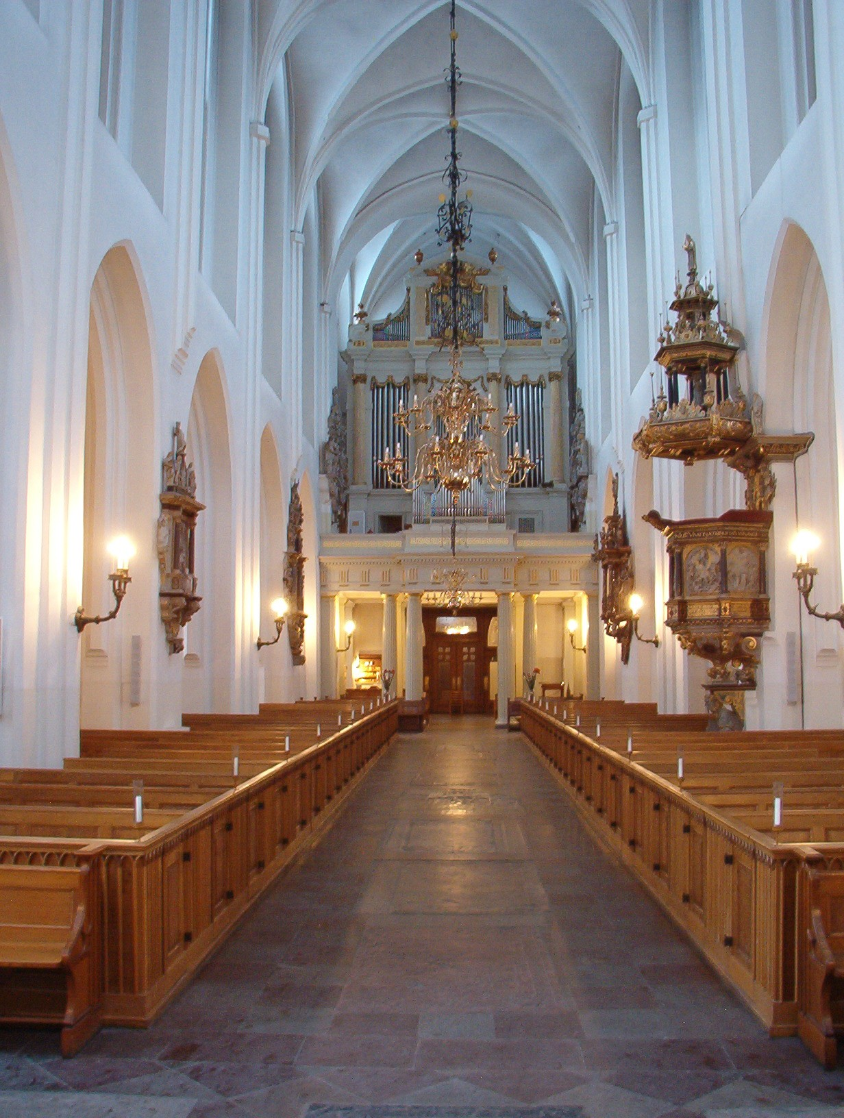 Sankt Petri kyrka, Malmö, interior from altar 2. Compare with Image:Sankt Petri kyrka, Malmö, interior from altar.jpg date December 2005